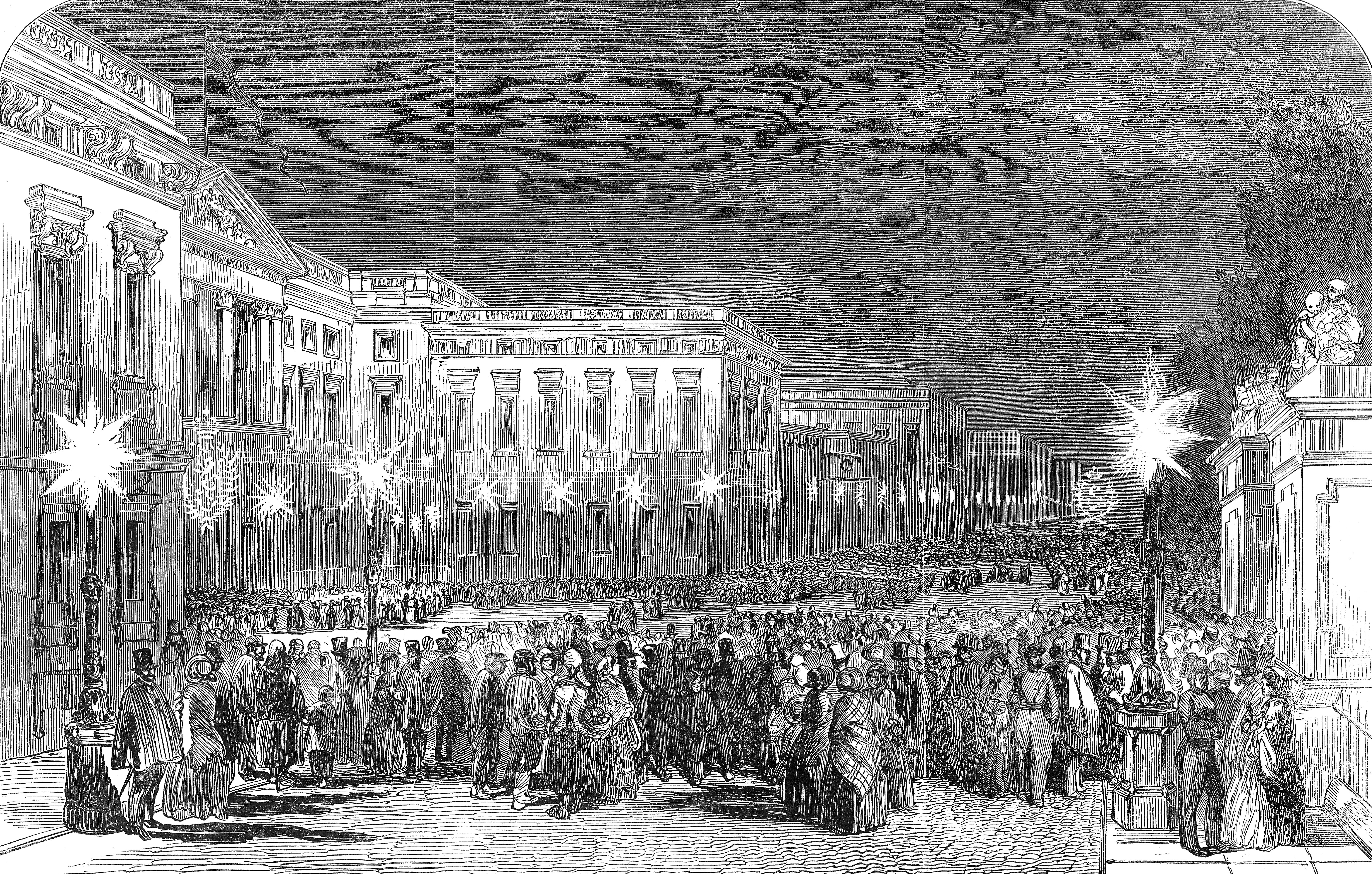 Illumination de la rue de la Loi à l’occasion de la prestation de serment du futur roi Léopold II de Belgique comme sénateur, Place de la Nation (Bruxelles), le 9 avril 1853.